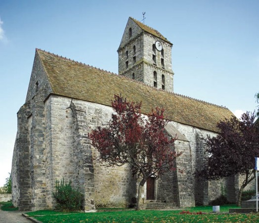 Eglise-saint-martin-mondeville